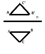 नेपाली: Reflection_image परावर्तन